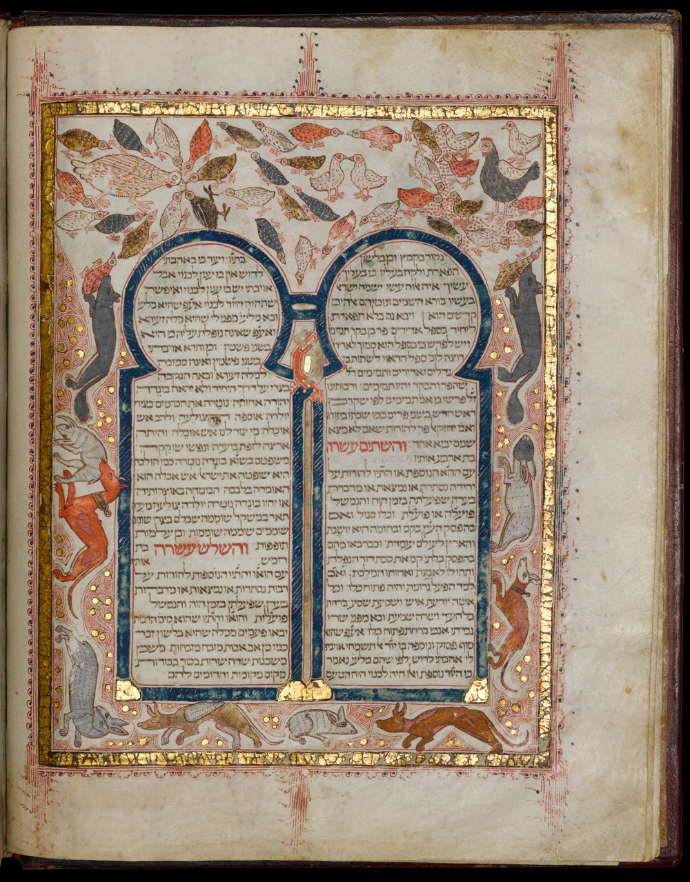 Páxina 7b da biblia Kennicott.